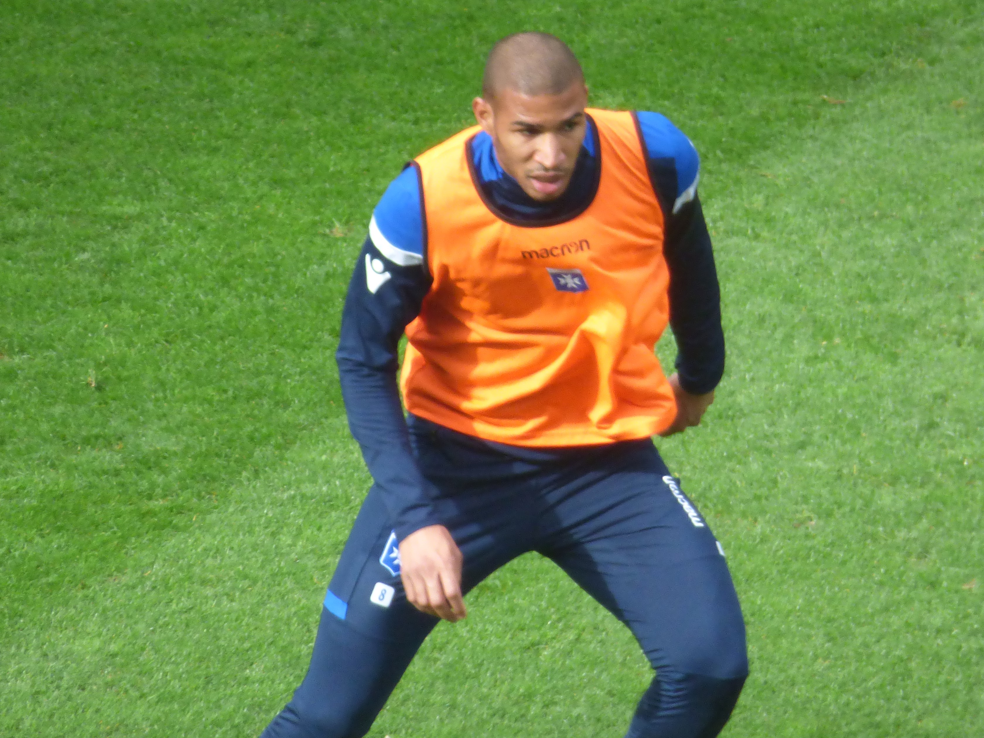 Jordan Adéoti avant le match RC Lens - AJ Auxerre, comptant pour la 28ème journée du championnat de France de football de Ligue 2 2018-2019, le 9 mars 2019 au Stade Bollaert-Delelis.